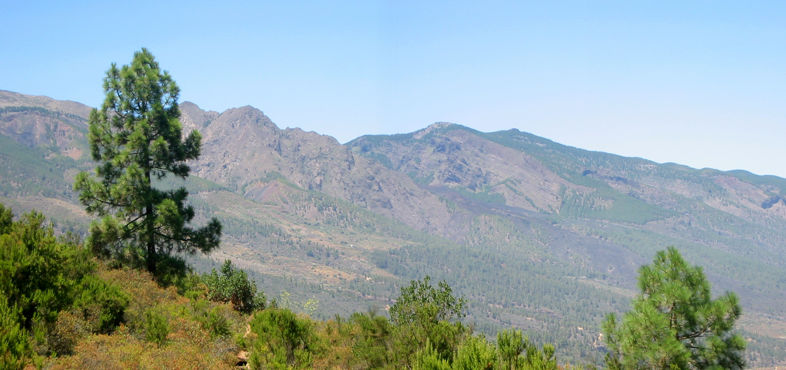 Montes de Güímar. En el centro, Volcán de Las Arenas (1705) junto al Pico Cho Marcial. A la derecha. Bajo el Pico, zona de cultivo de viñas de Las Dehesas y Los Pelados. Árboles: Pinus canariensis. Tenerife, Canarias, España.